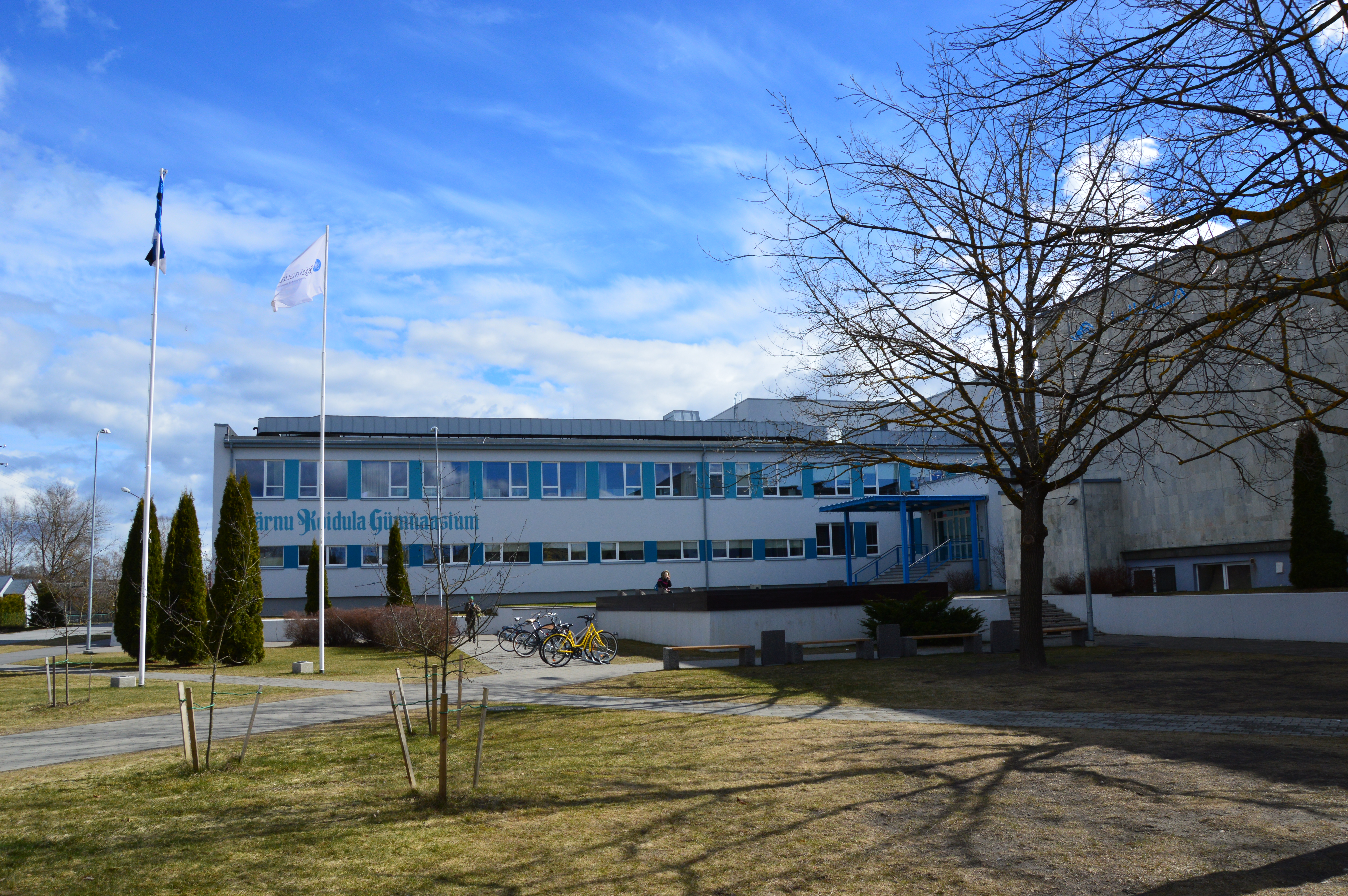 Pärnu Koidula Gümnaasium